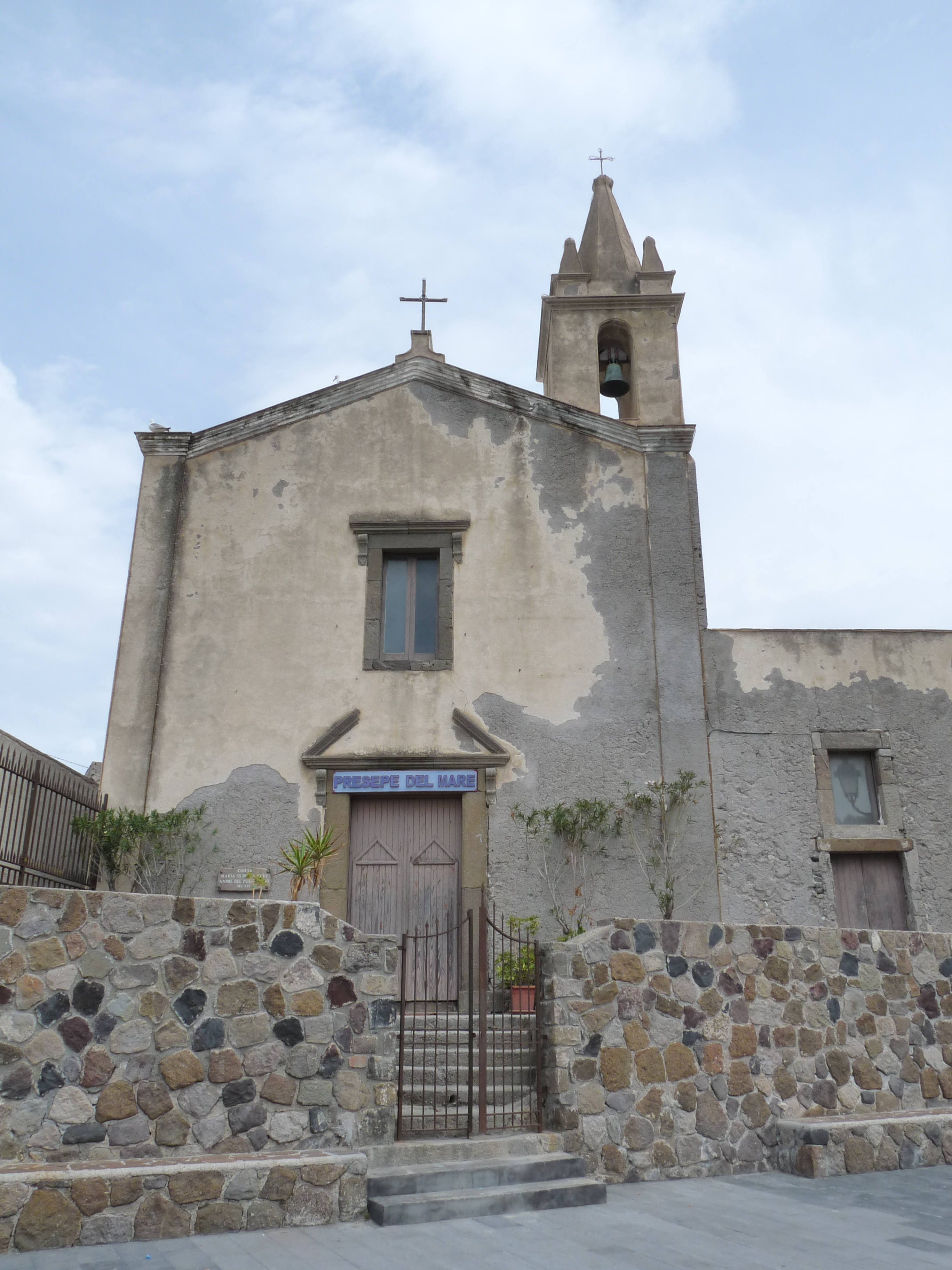 Eglise des Âmes du Purgatoire (Chiesa Maria SS della Neve Anime del Purgatorio) à Lipari (Sicile). XVIe siècle.